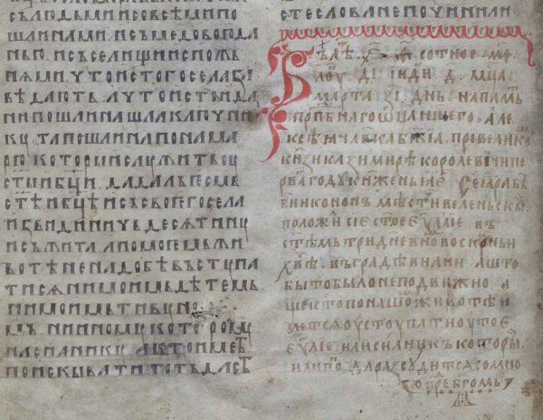 Рукописная книга XIV века